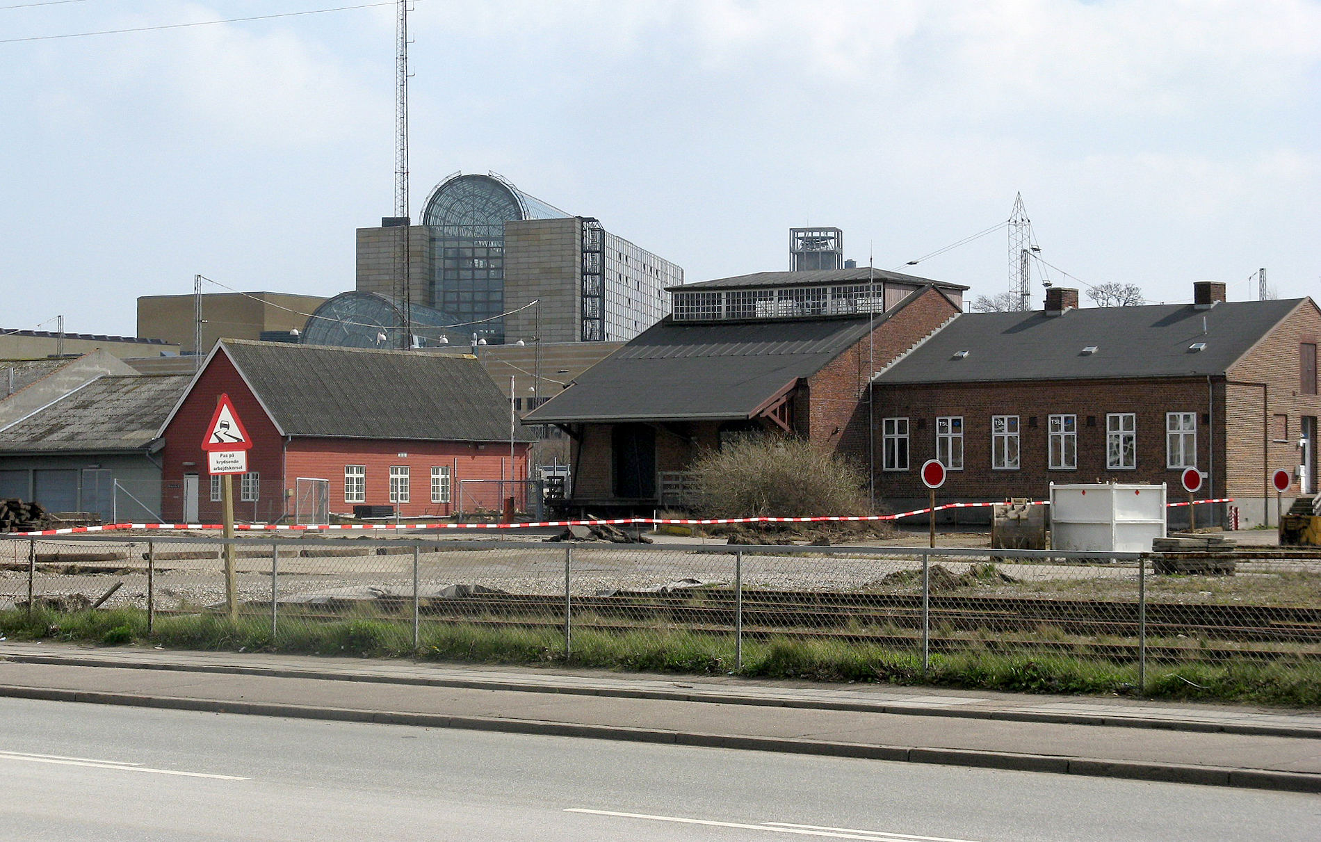 Buildings at Aarhus Godsbanegaard, Jylland, Denmark